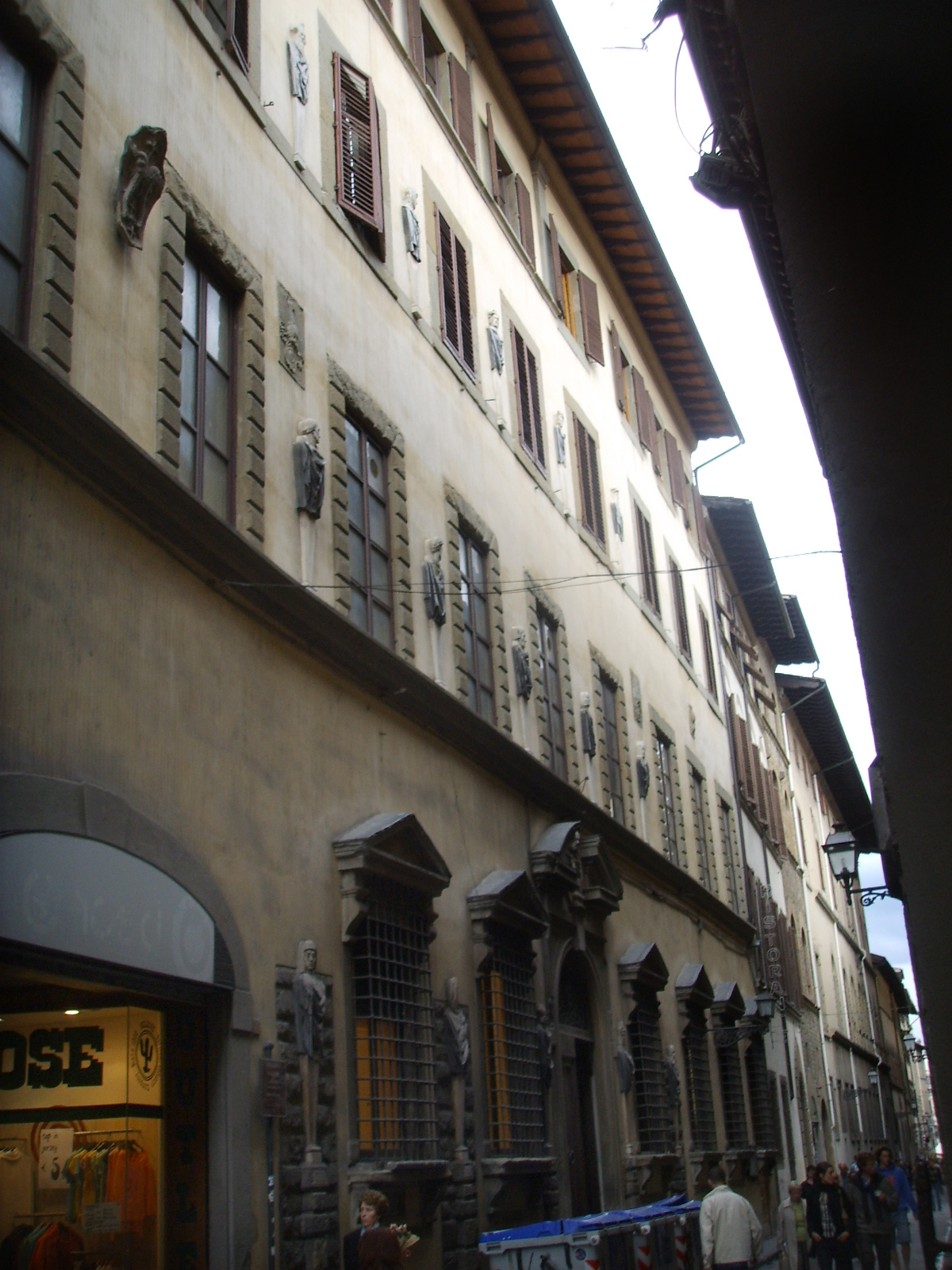 Palazzo dei visacci 01